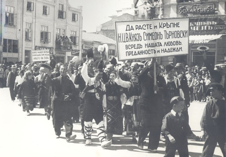 4-ти селскостопански културен и национален събор, 28 - 29 август 1938 г., гр. Варна. Парад на участниците в събора по ул. Княз Борис І.